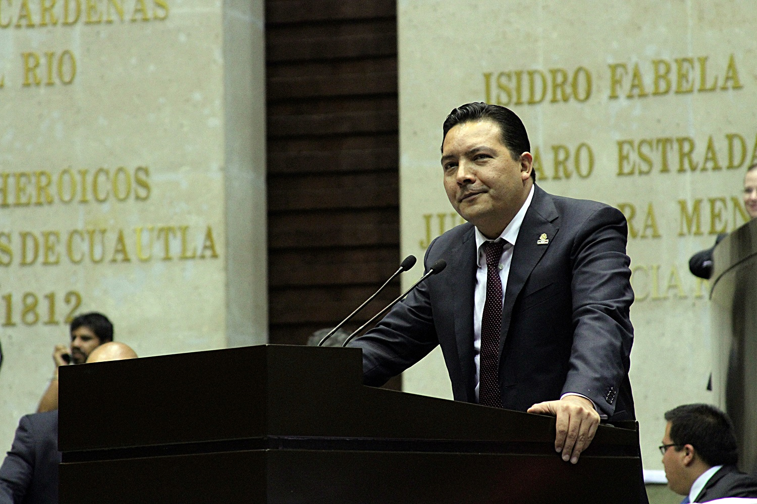 Para gente de compromisos, un hombre de resultados.